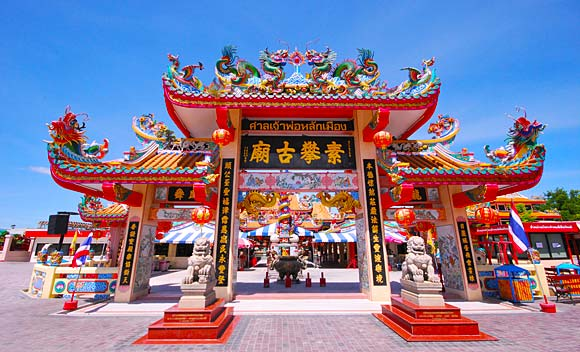 看看